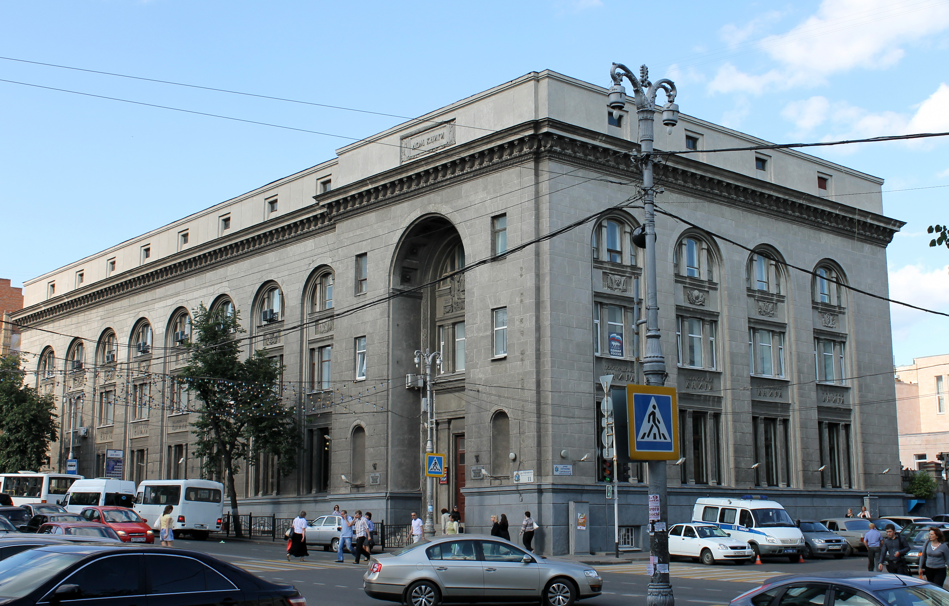 Дом книги (Курск)